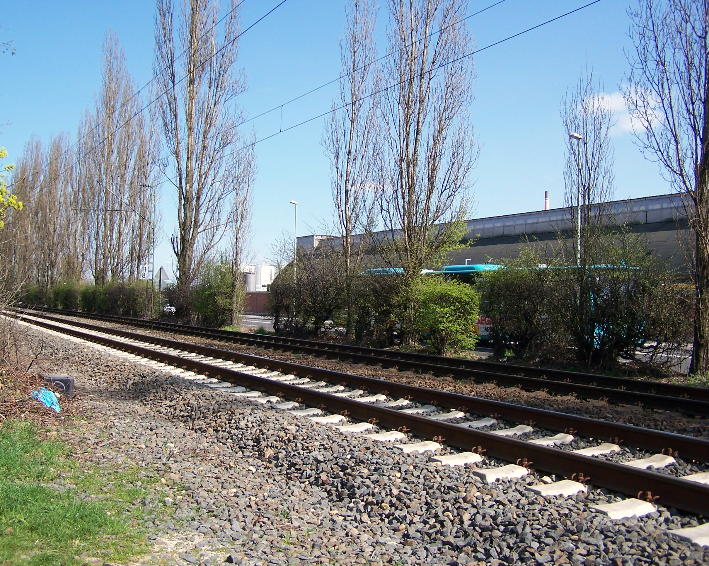 Taunus-Eisenbahn und Hoechster-Farben-Straße in Sindlingen